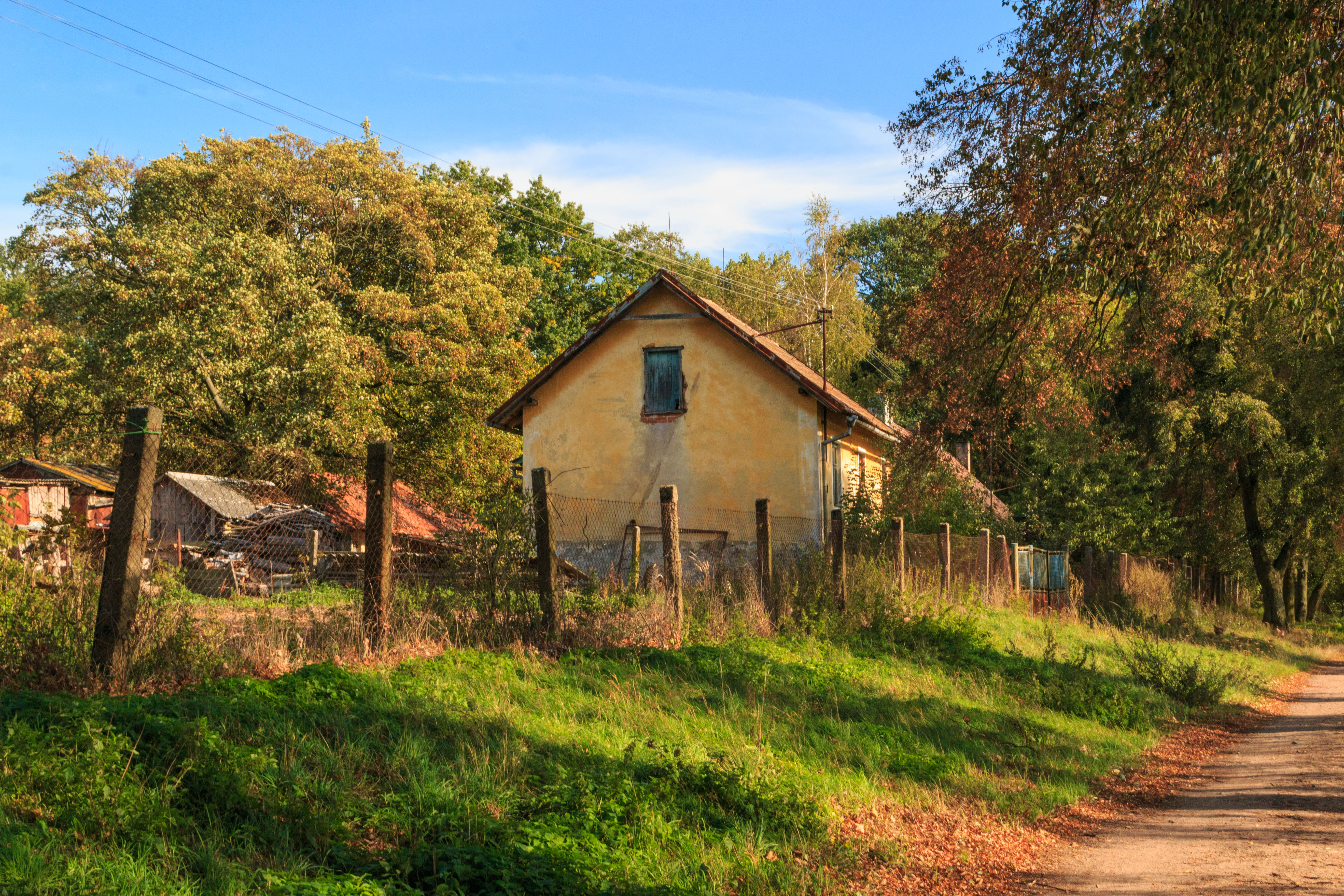 Samota Cihelna u Kladrub nad Labem Project: Vodstvo